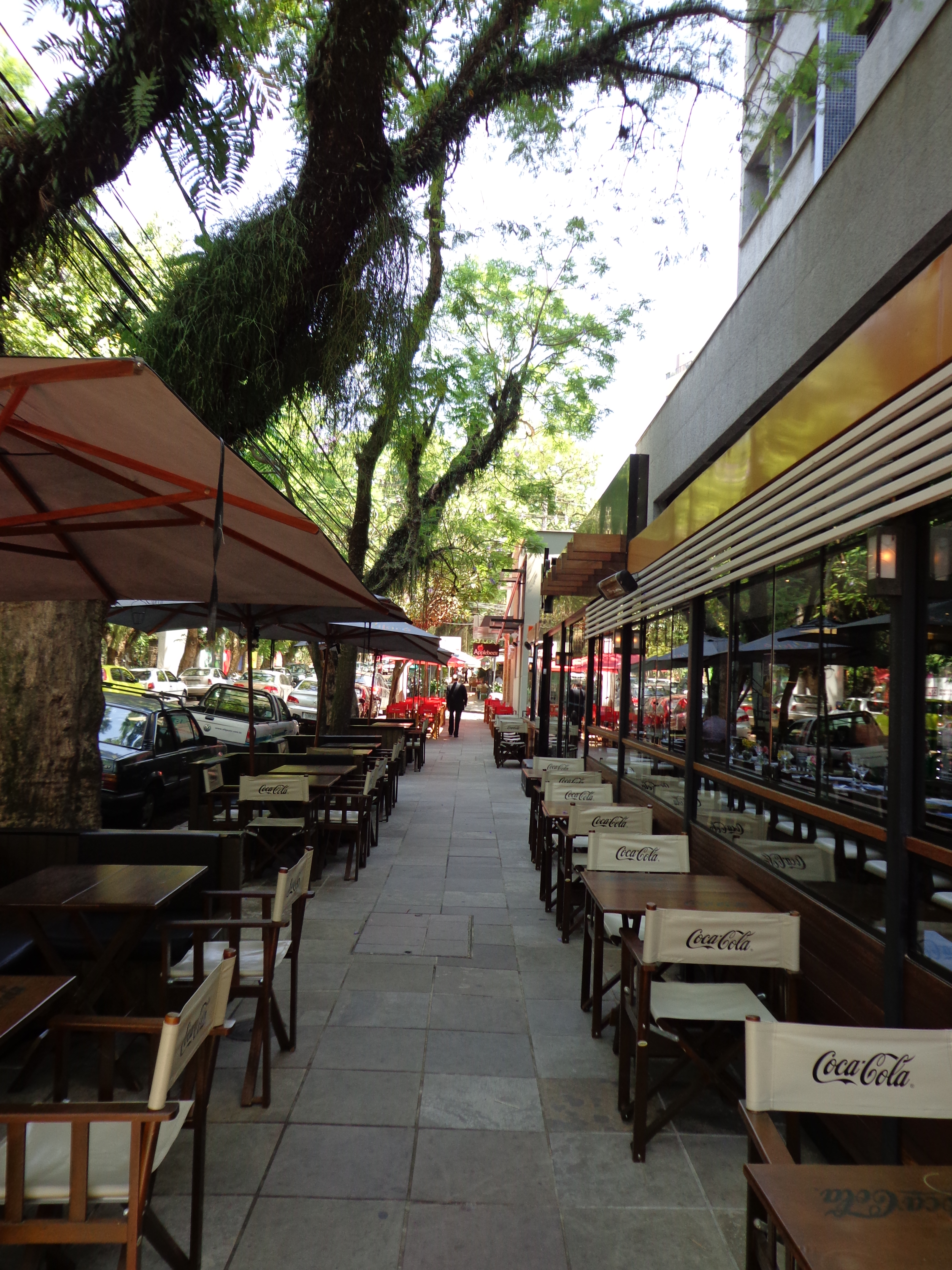 "Calçada da Fama", um trecho da Rua Fernando Gomes, na cidade de Porto Alegre, repleto de bares e cafés chiques.